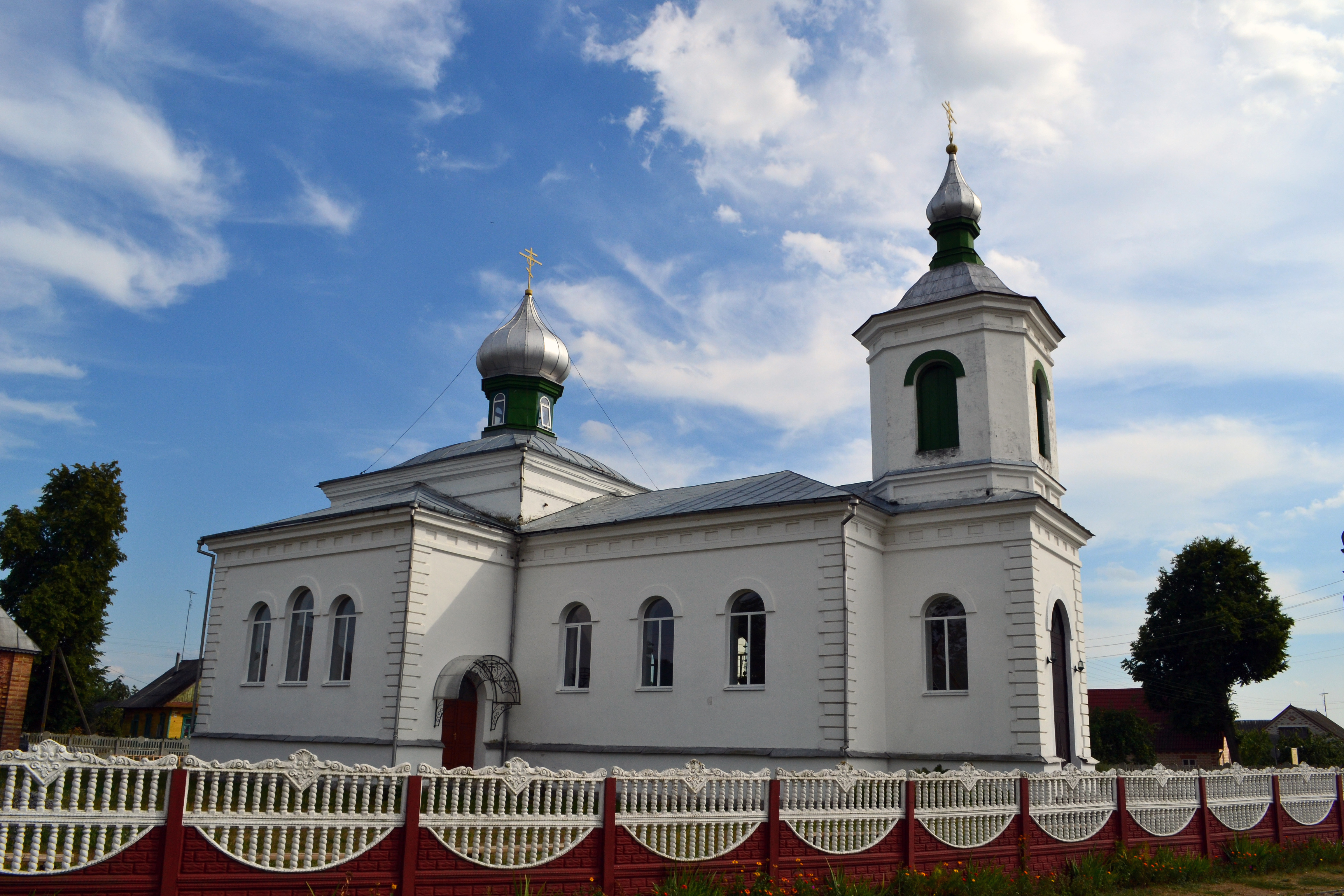 Беларуская (тарашкевіца): Праваслаўная царква сьвятога Сімяона ў Малечы (Бярозаўскі раён).